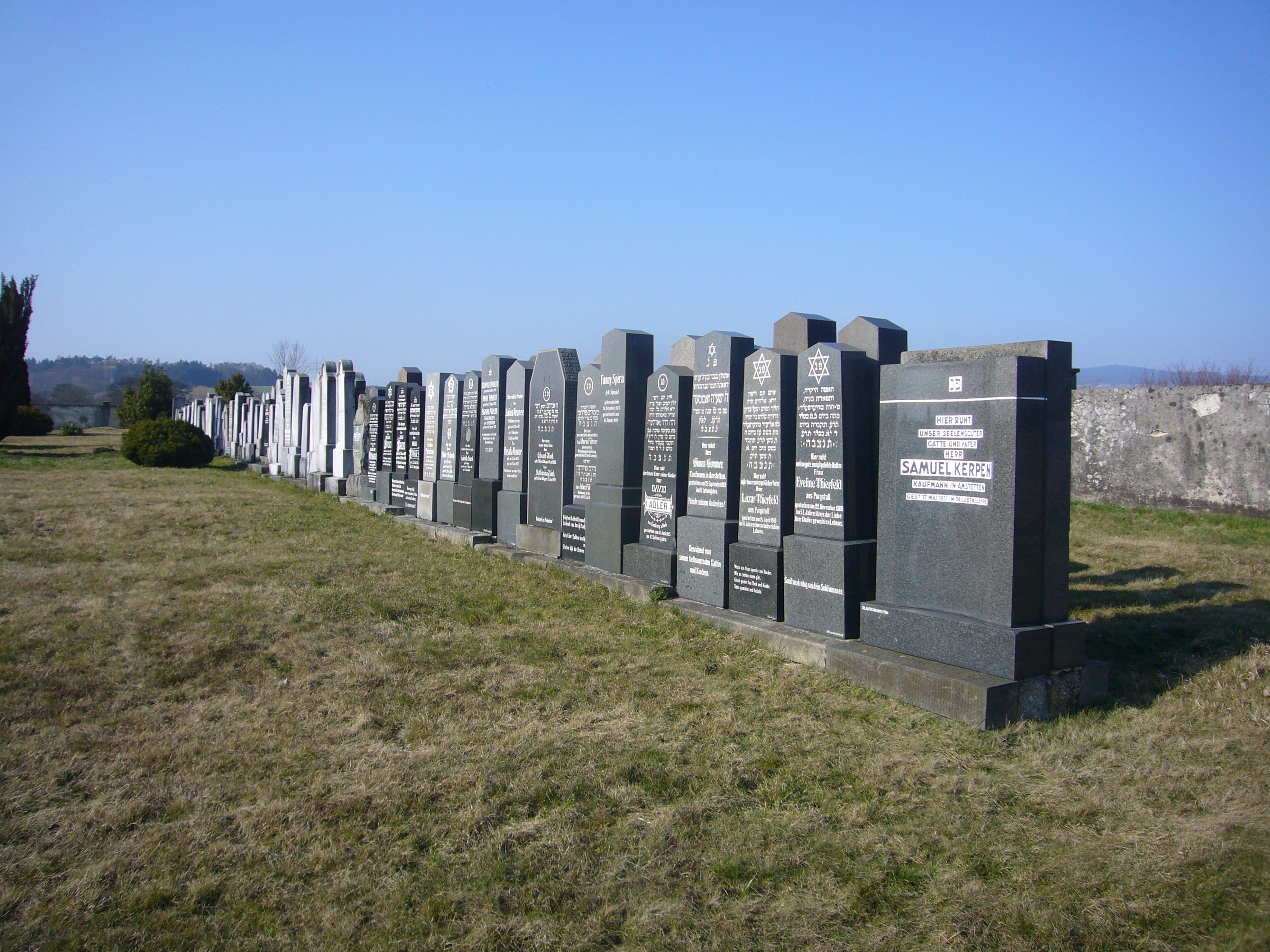 Jüdischer Friedhof Ybbs Übersicht mit Grabsteinen